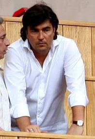 Nikolay Pisarev